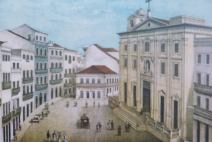 Litografia: Largo e Igreja do Corpo Santo em 1863. Recife, Pernambuco, Brasil.